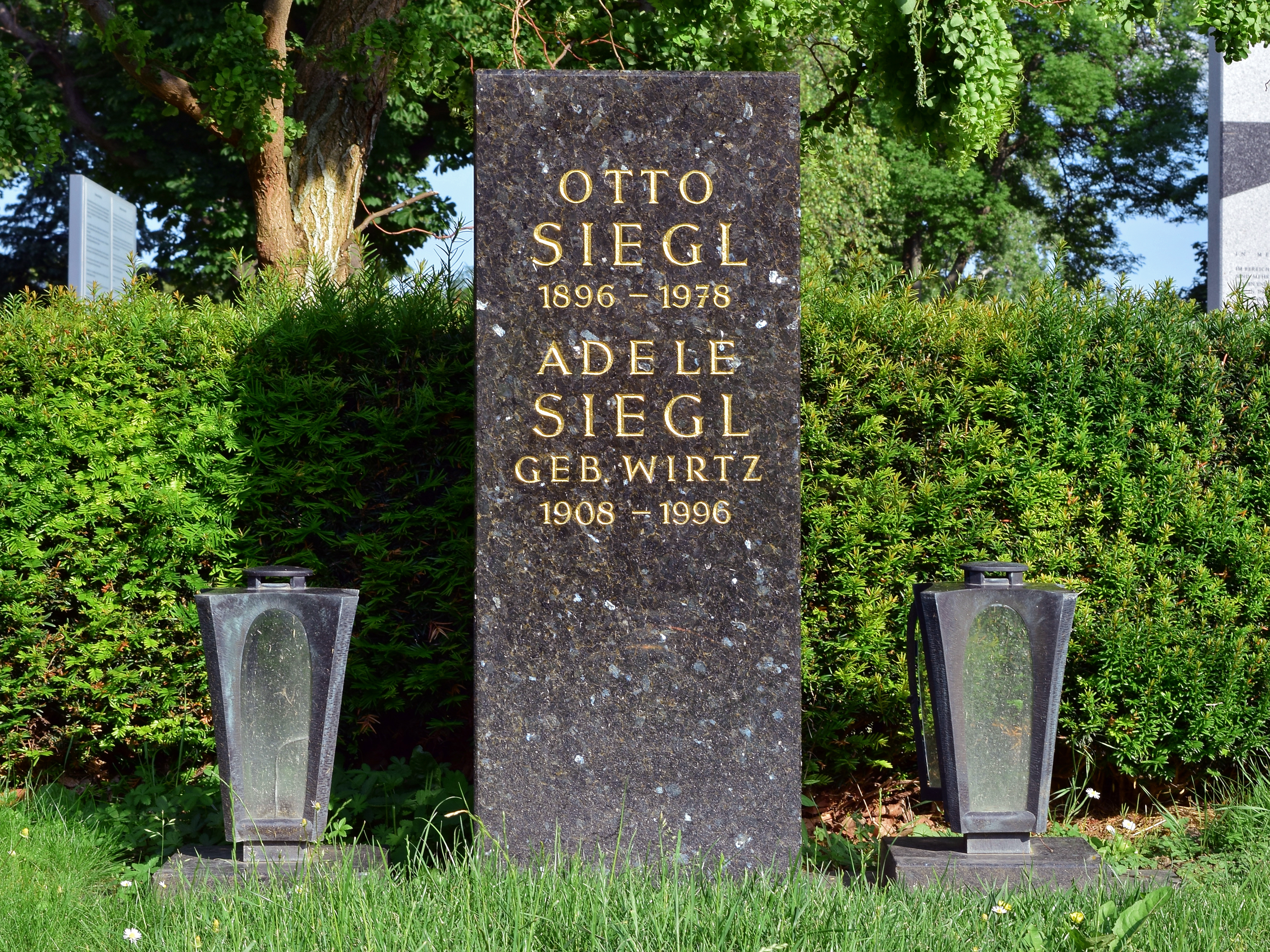 Ehrenhalber gewidmetes Grab von Otto Siegl auf dem Wiener Zentralfriedhof, Gruppe 40.